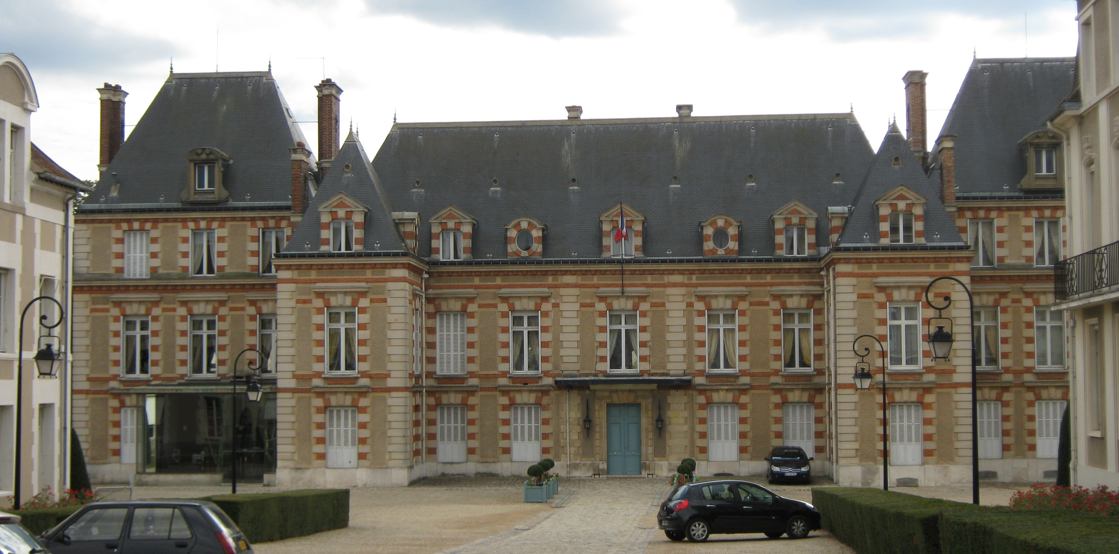 Hôtel de préfecture de Seine-et-Marne, anciennement abbaye de Saint-Père, à Melun .